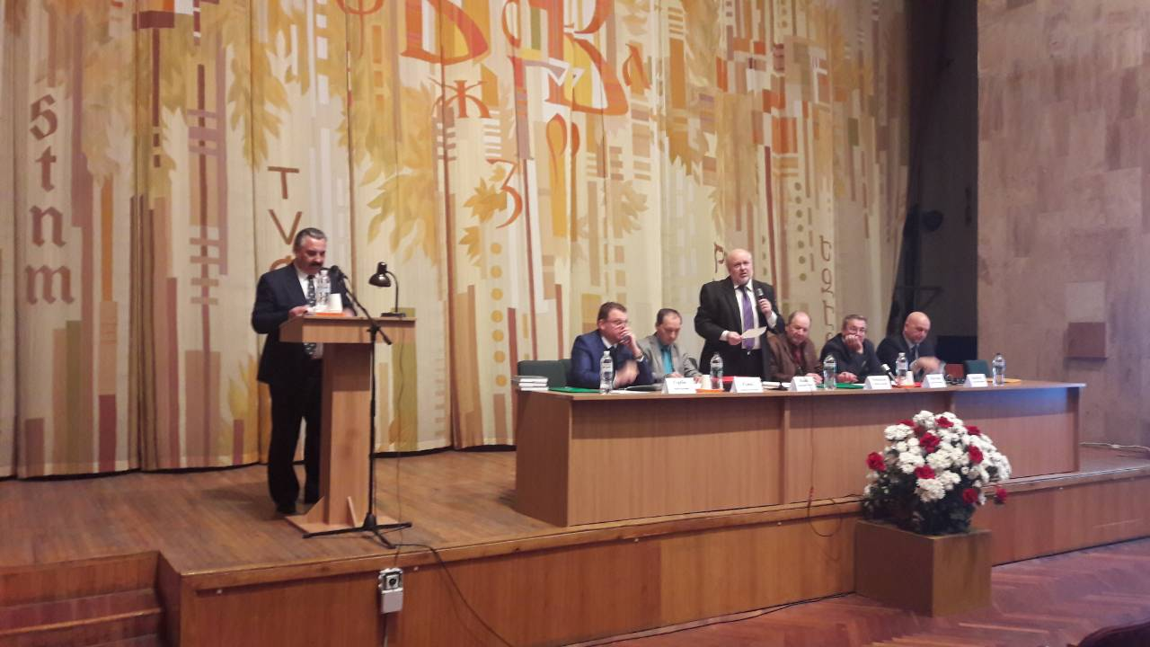 Фотознімок під час проведення конференції в НБУВ